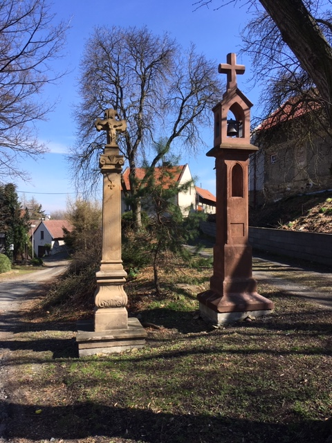 Zvonička a kamenný kříž, Ždánice u Kouřimi